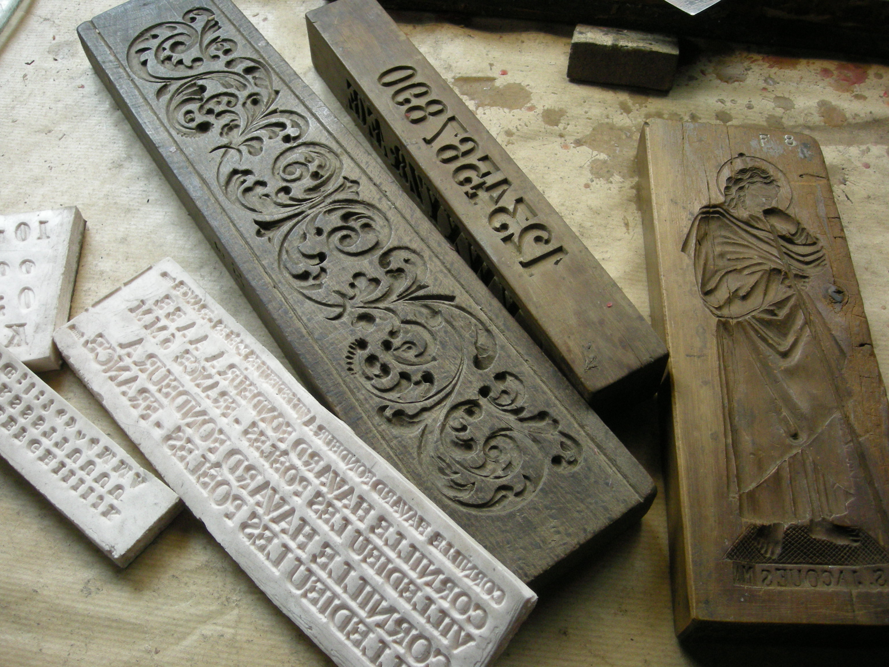 Fonderie de cloches Cornille-Havard à Villedieu-les-Poêles (Manche, Normandie). Moules utilisés pour la décoration des cloches : anciens en bois à droite, modernes à gauche.